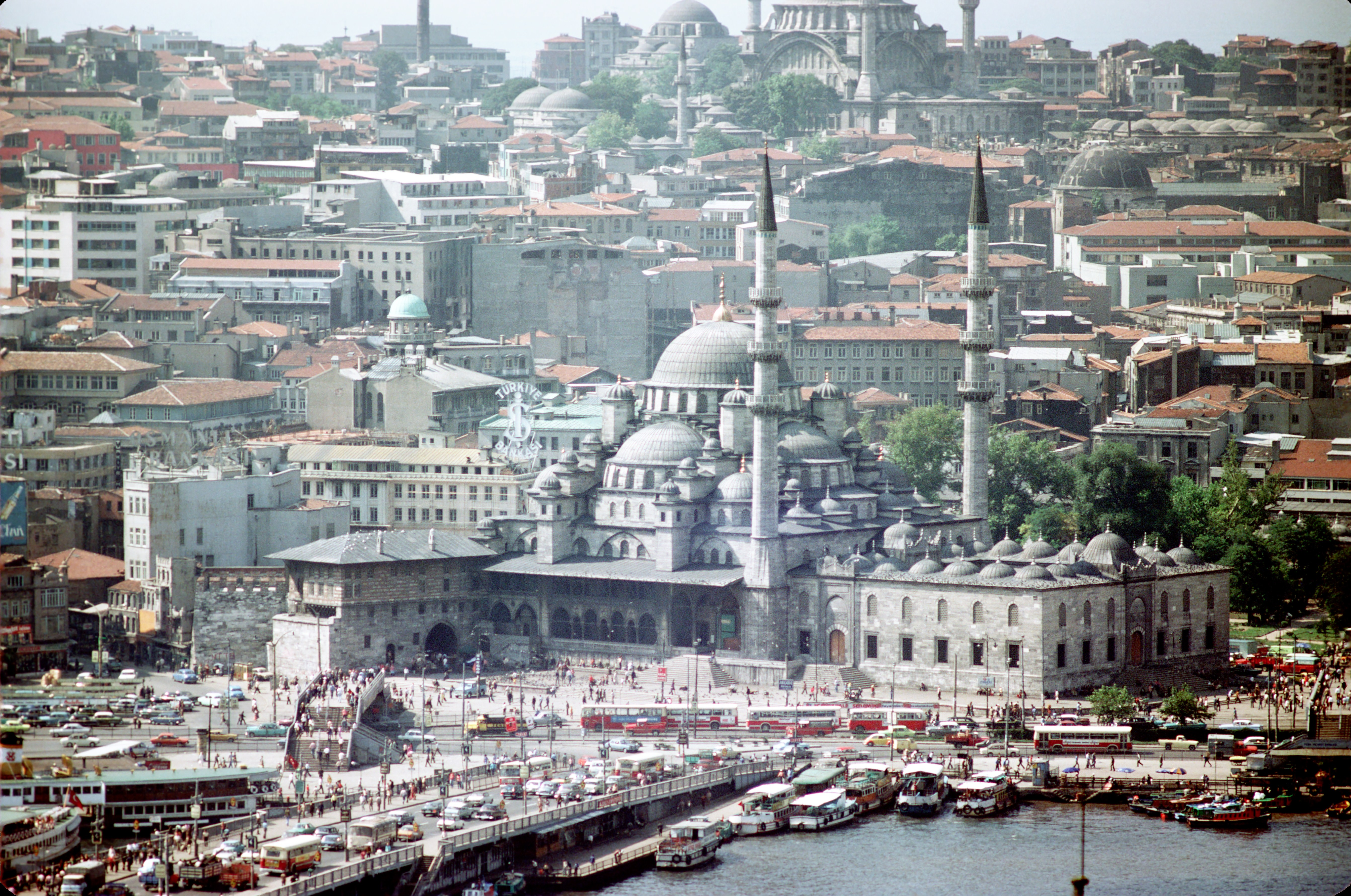 La Yeni Cami (Mosquée Neuve) et le Galata Köprüsü (Pont de Galata). La Mosquée Neuve est située sur la place d'Eminönü (Eminönü Meydanı). Diapositive scannée avec traitement numérique ROC/GEM. Istanbul, Turquie.